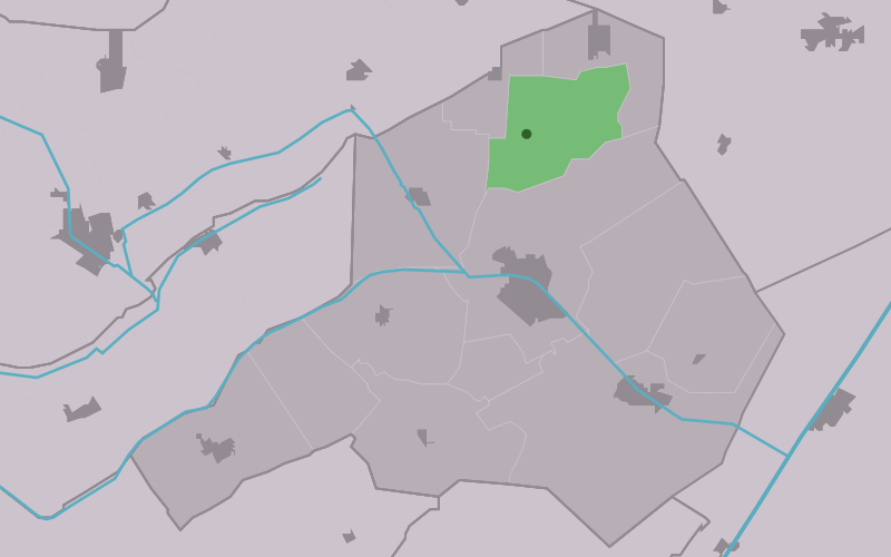 Kaartsje fan himrik fan De Haule